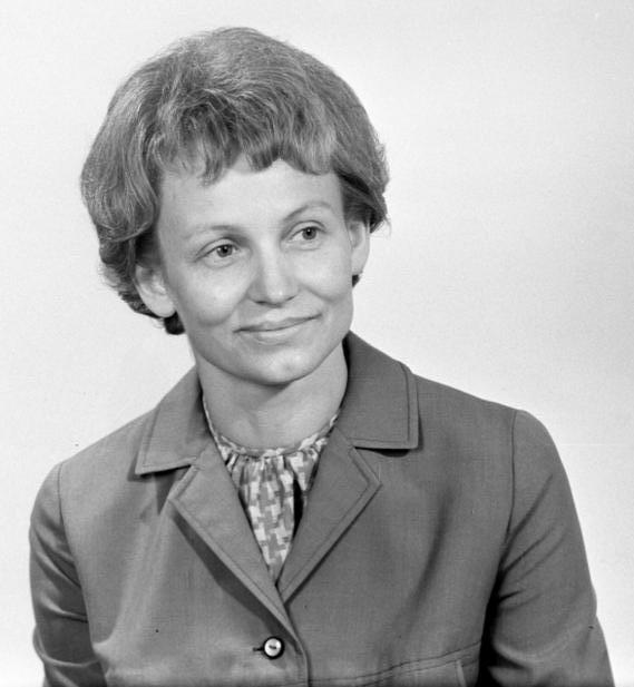 Zentralbild/Hochneder 14.7.1967 Margot Honecker Minister für Volksbildung Mitglied des Zentralkomitees der SED